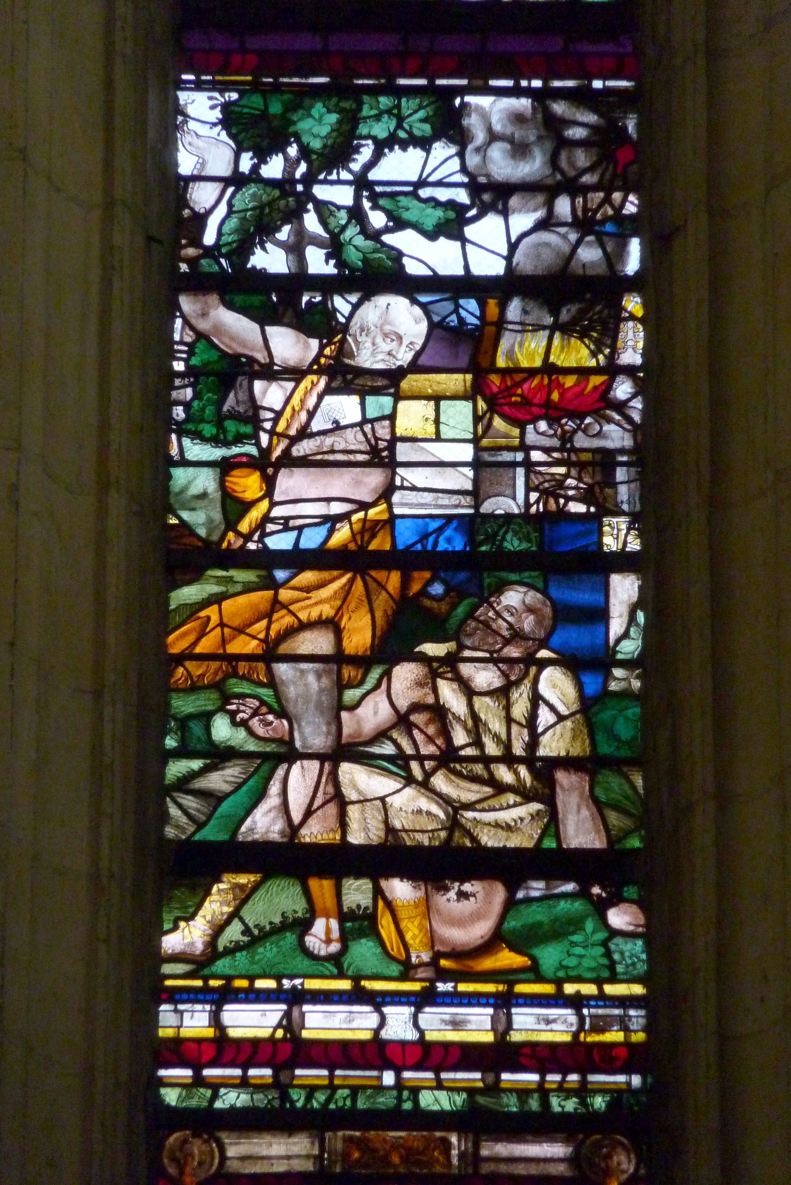 Katholische Pfarrkirche Saint-Aspais in Melun im Département Seine-et-Marne in der Region Île-de-France (Frankreich), Bleiglasfenster im Chor aus dem 16. Jahrhundert, Darstellung: Kain erschlägt Abel.